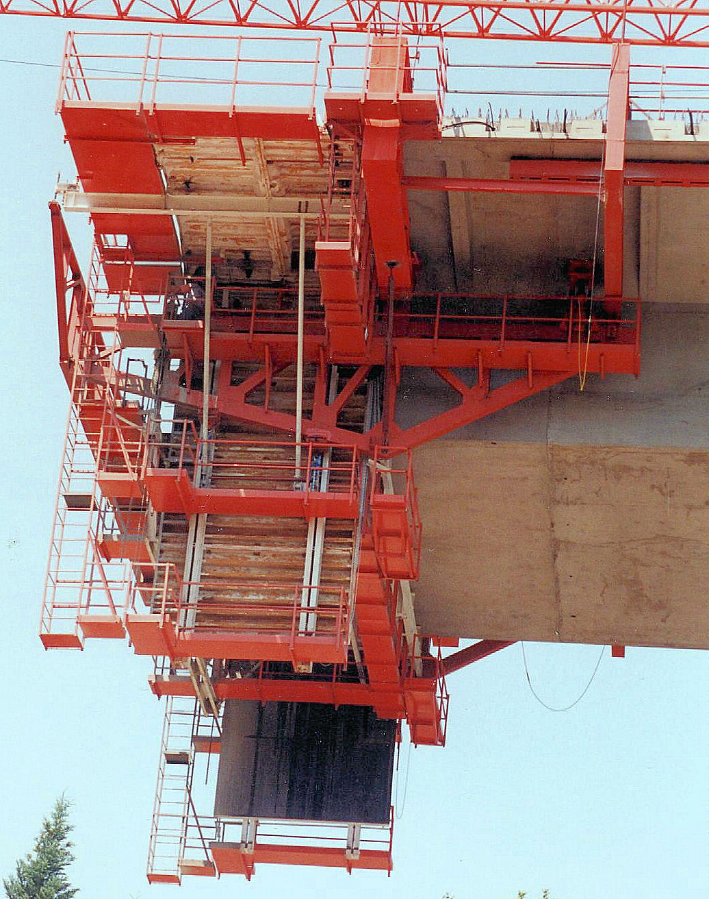 Viaduc de la Barricade - Equipage mobile pour la réalisation d'un voussoir du tablier